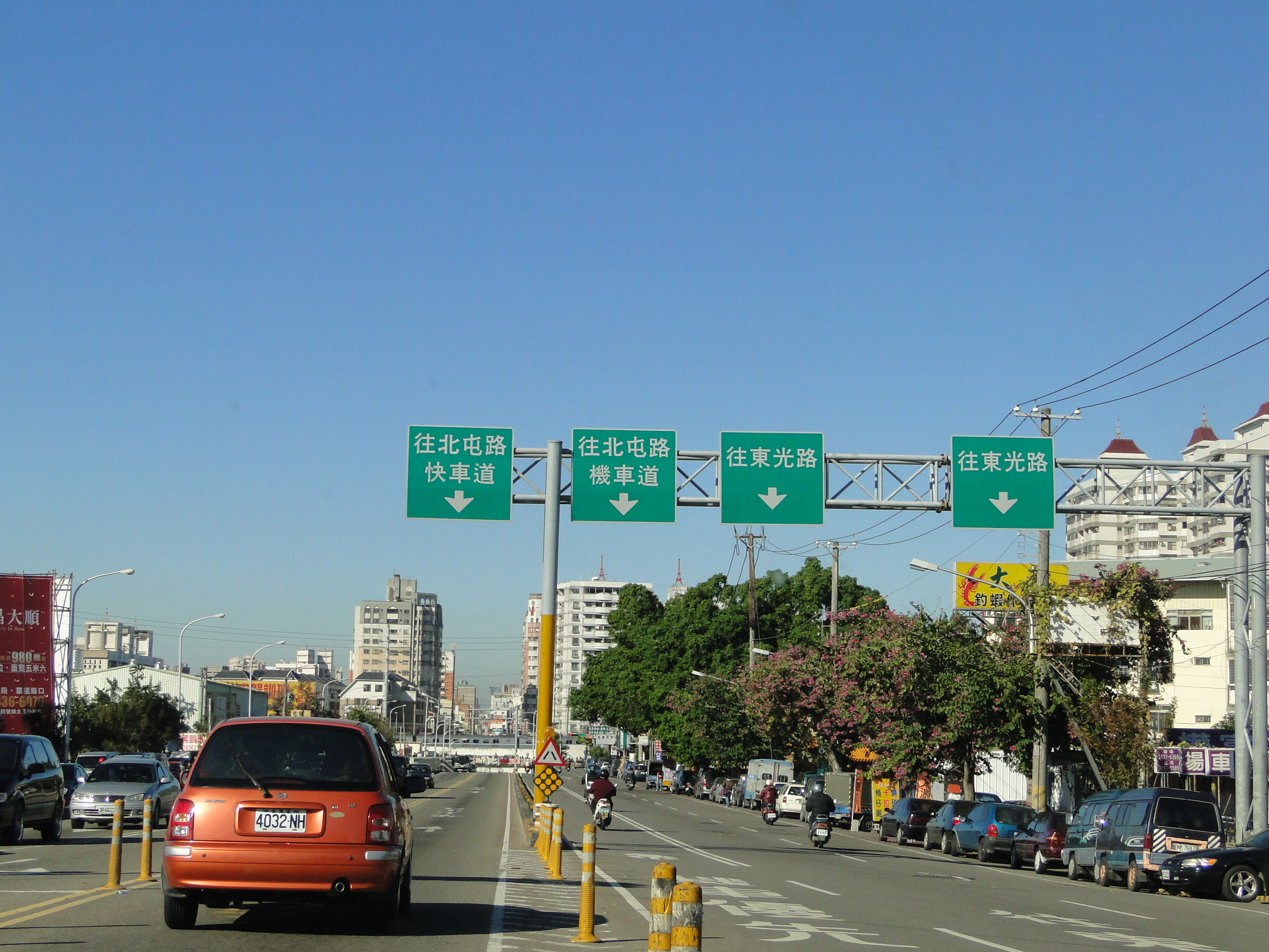 中文（台灣）: 台灣台中市太原路一景。